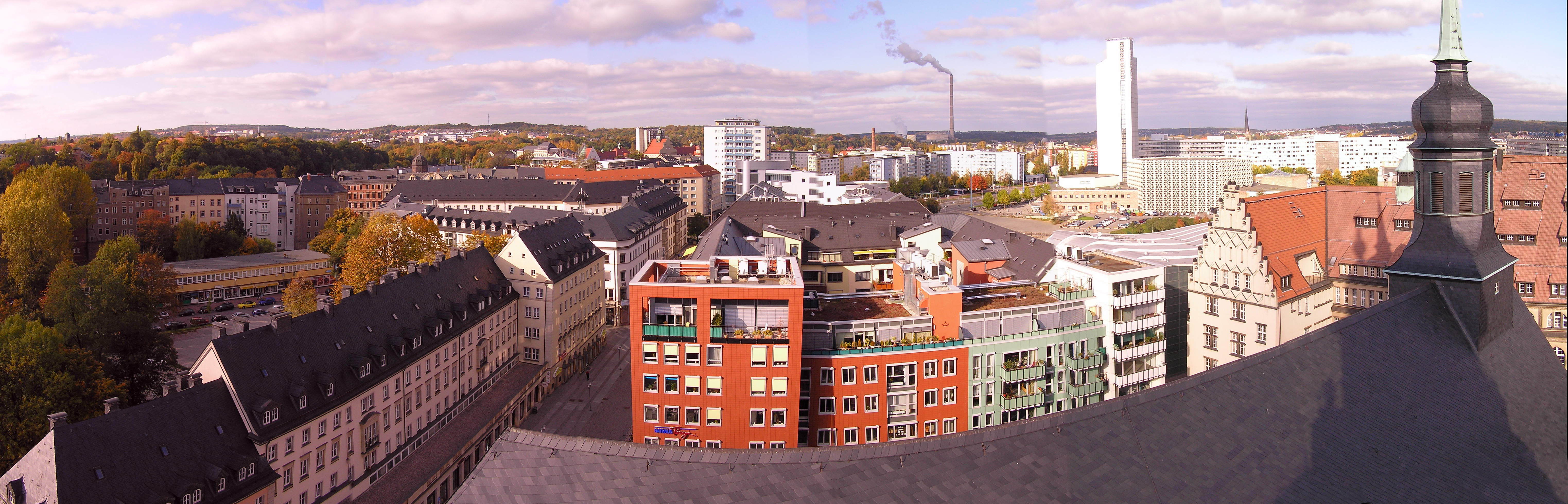 Mittelstandsmeile, Innere Klosterstraße Fotograf: André Pistotnik